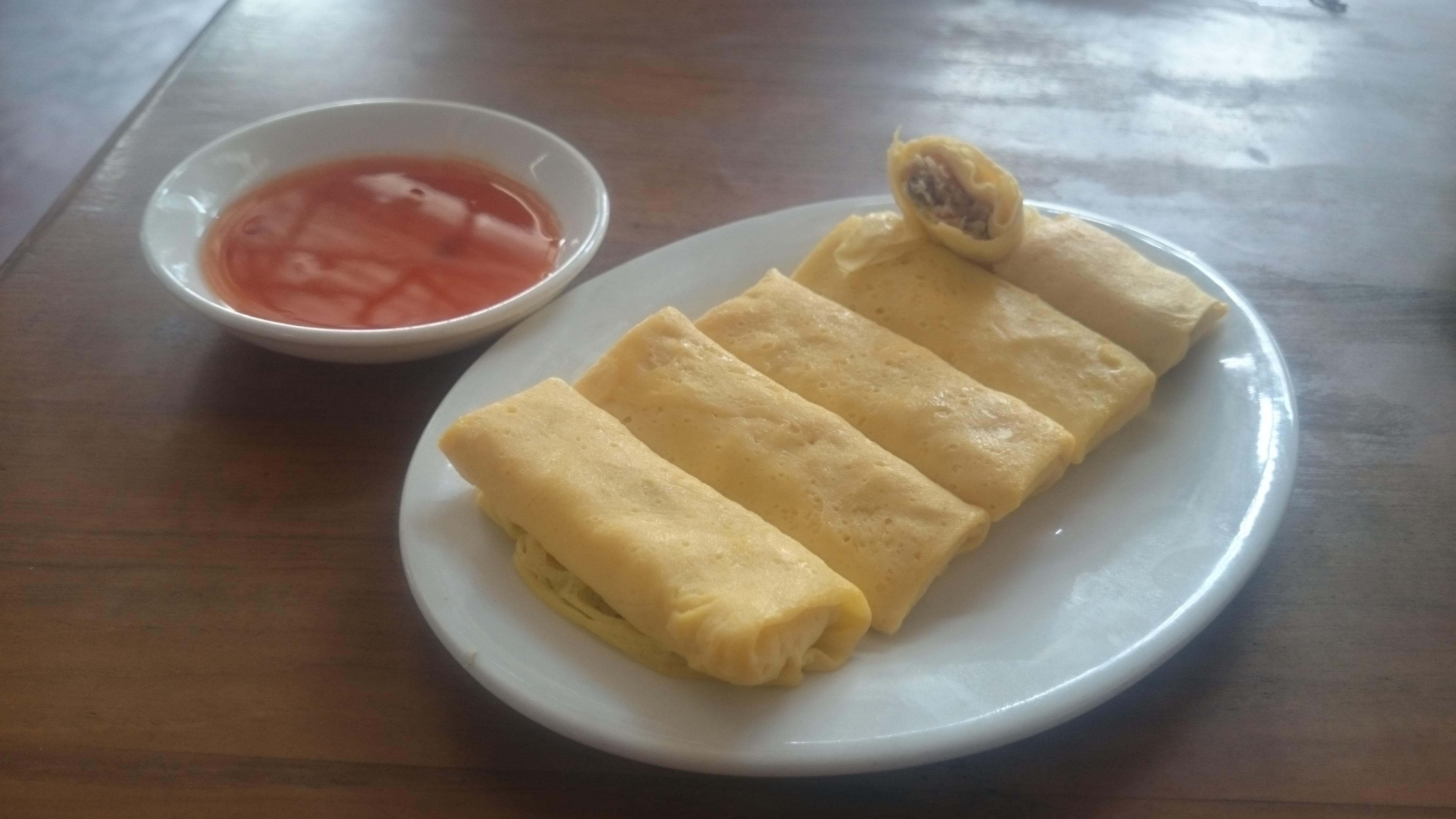 မြန်မာဘာသာ: မန္တ​လေးမြို့ရဲ့ ​တော်ဝင်နန်းသုံးအစားအစာ ခနုံထုပ်